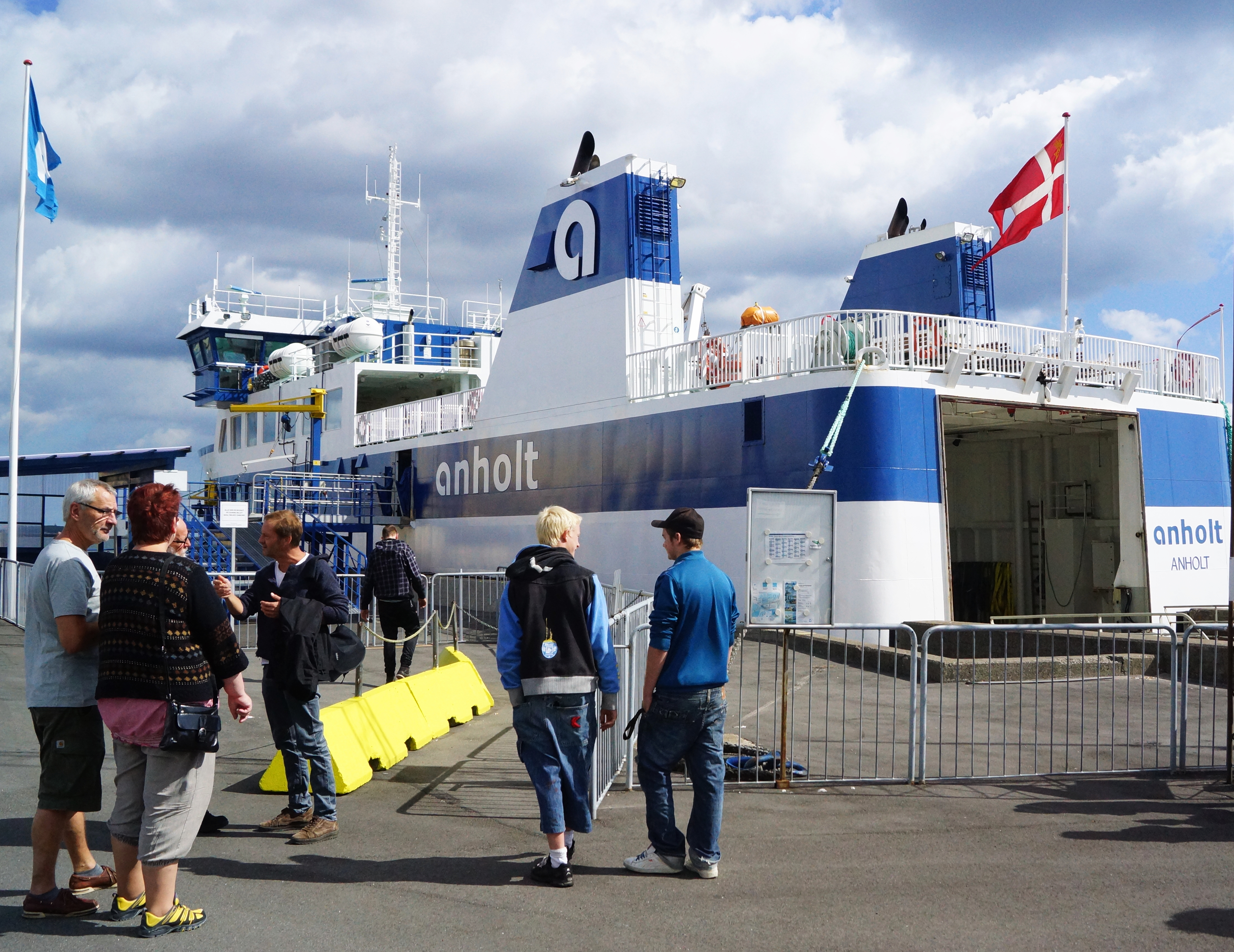 Anholtfærgen